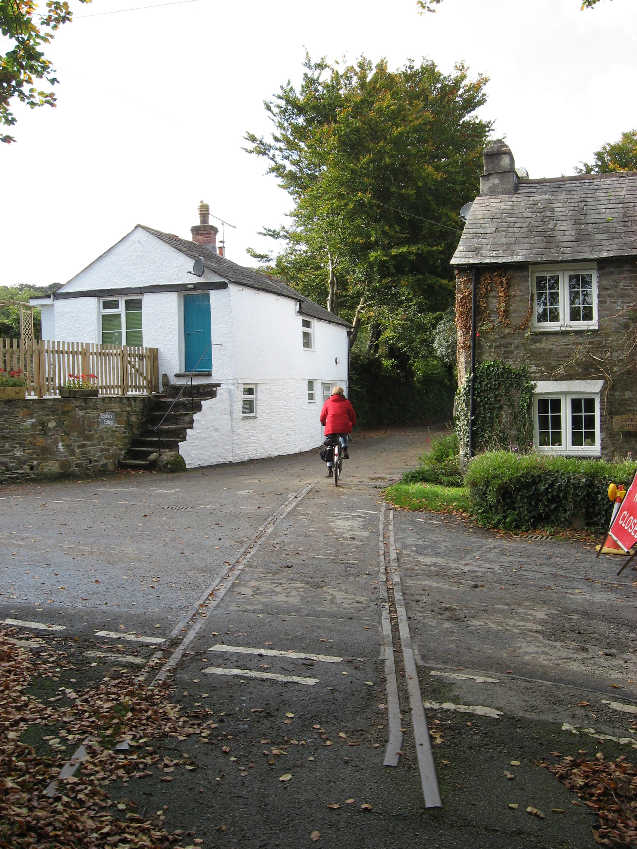 Hellandbridge.